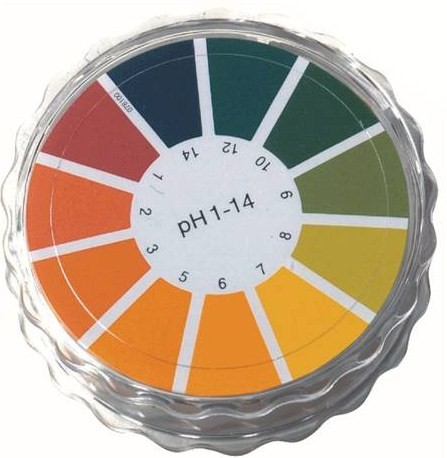 indicador